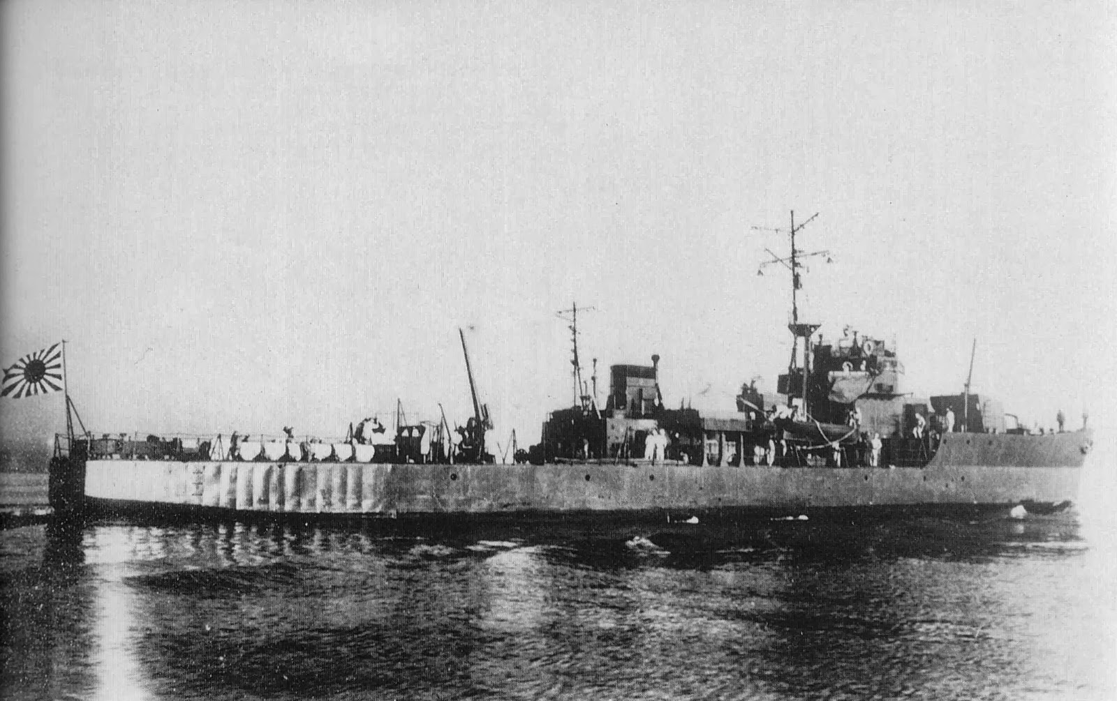 日本海軍 第一号型海防艦 「第一号海防艦」、神戸沖